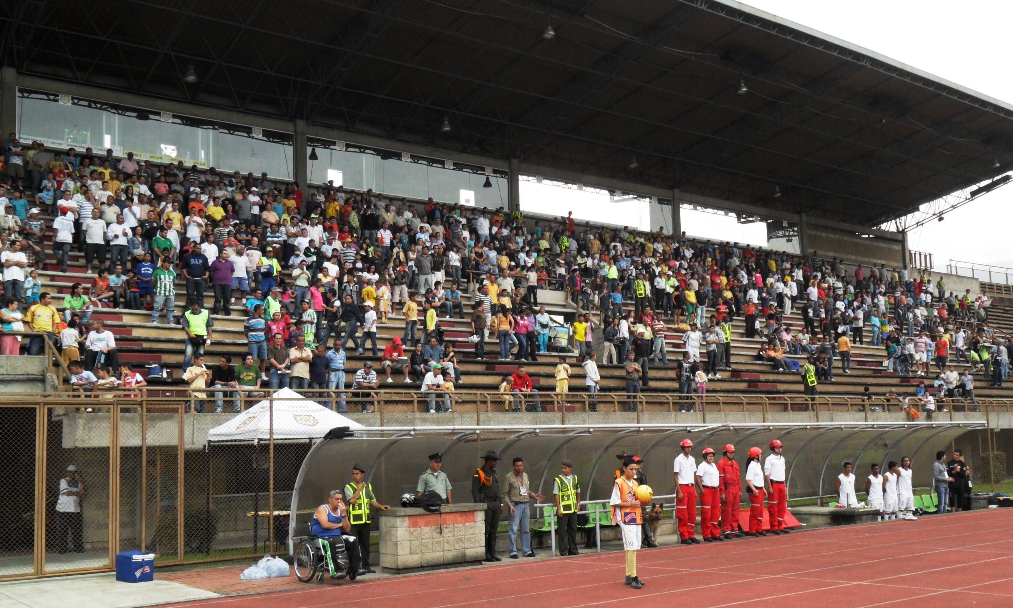 Estadio Metropolitano Ciudad de Itagüí (Estadio de Ditaires).